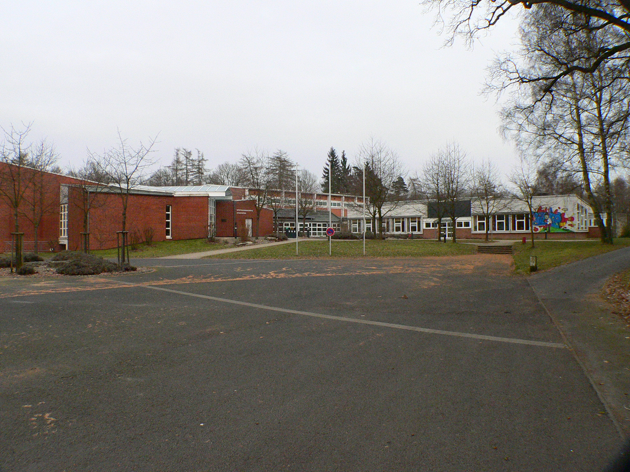 Ehemalige Burg Sensenstein: Sportbildungsstätte des Landkreises Kassel, Sport- und Schwimmhalle